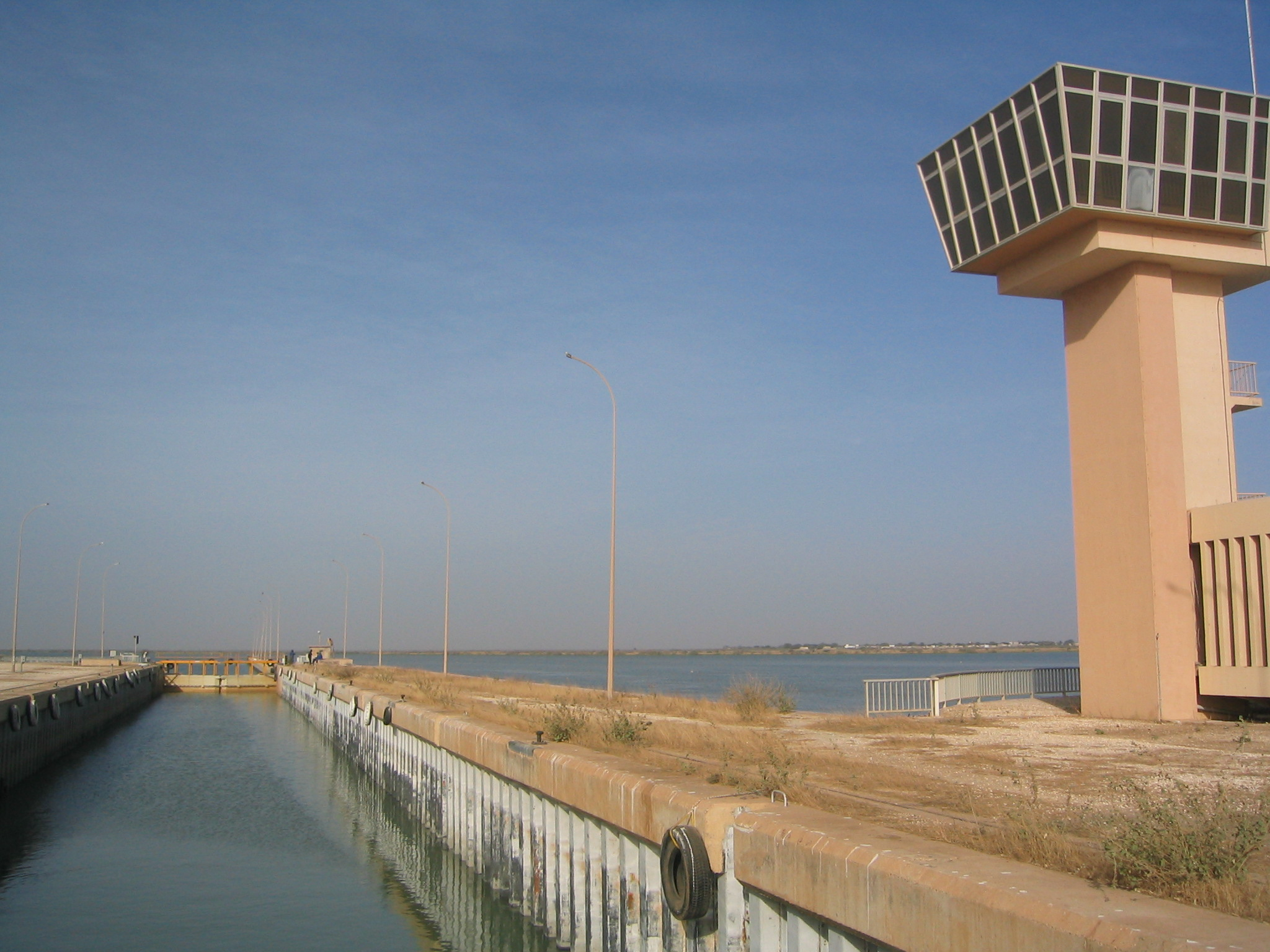 Ecluse de navigation au barrage de Diama (Sénégal-Mauritanie)